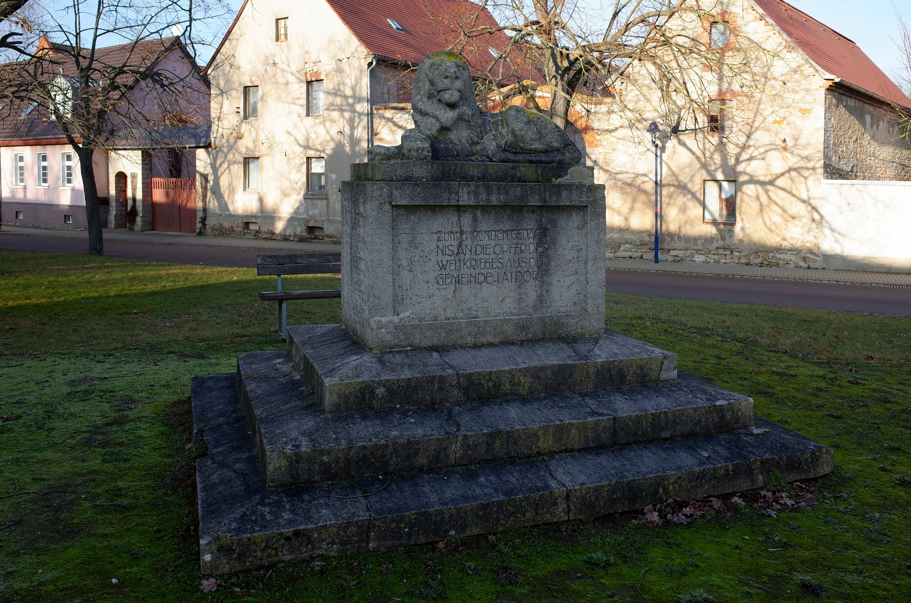 Nienburg (Saale), Ortsteil Latdorf, Kriegerdenkmal (Baudenkmal im Denkmalverzeichniss Sachsen-Anhalt, Erfassungsnummer: 094 60783 000 000 000 000 [1])